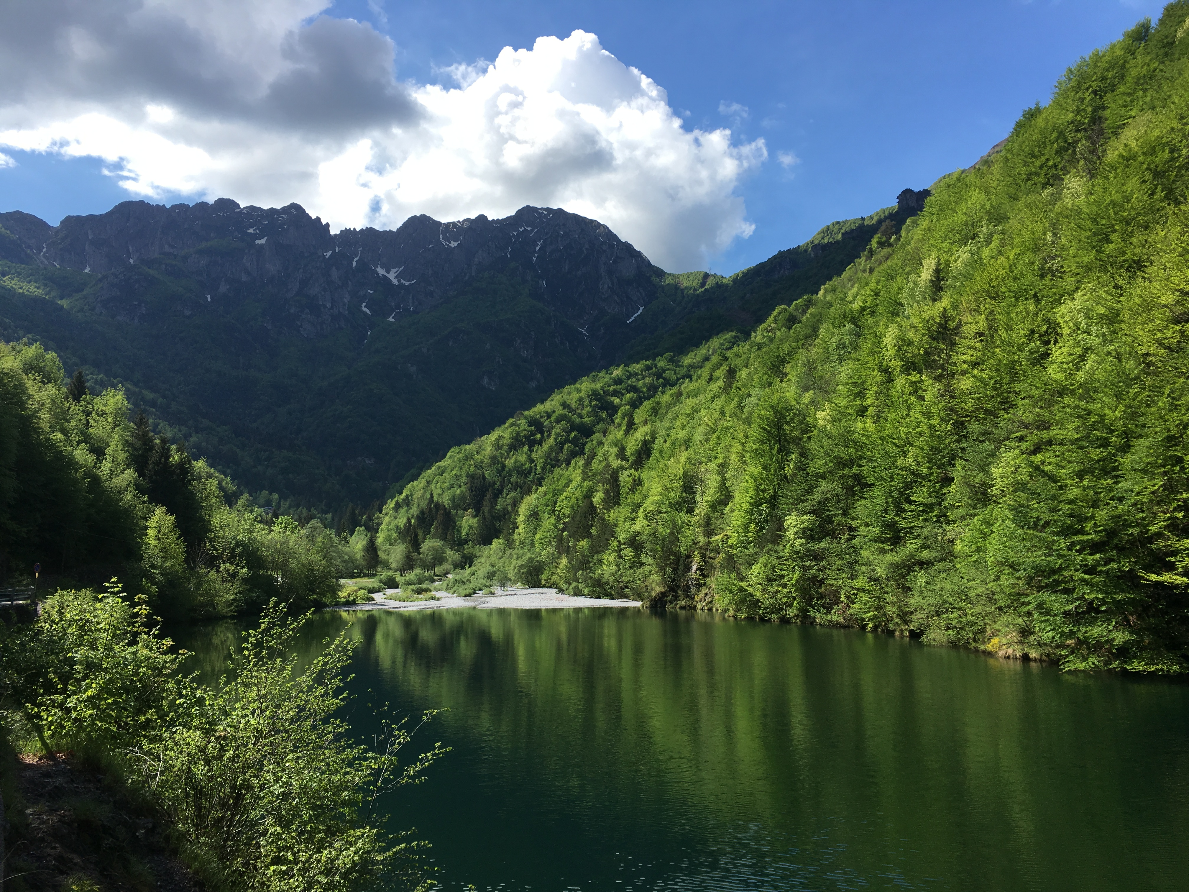 parco regionale delle Orobie Bergamasche (Q3895555)